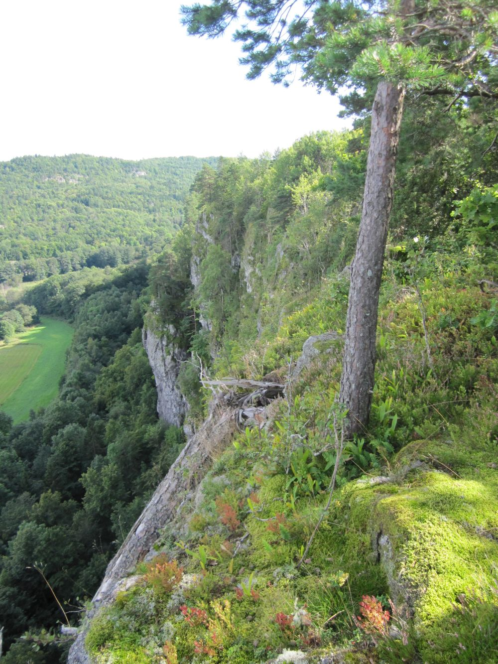 Luftig utsikt fra toppen av Veggefjell.